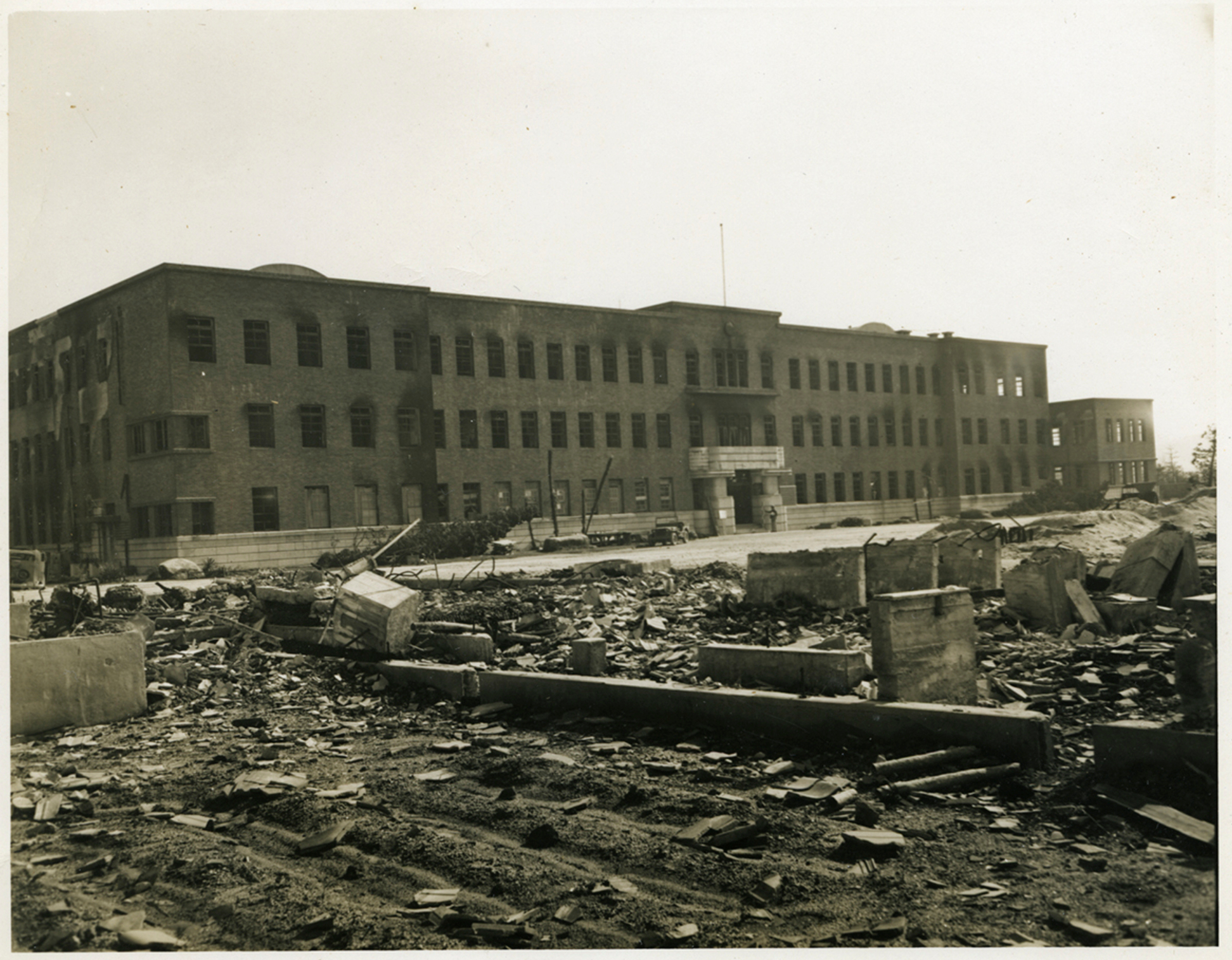 旧広島文理科大学本館